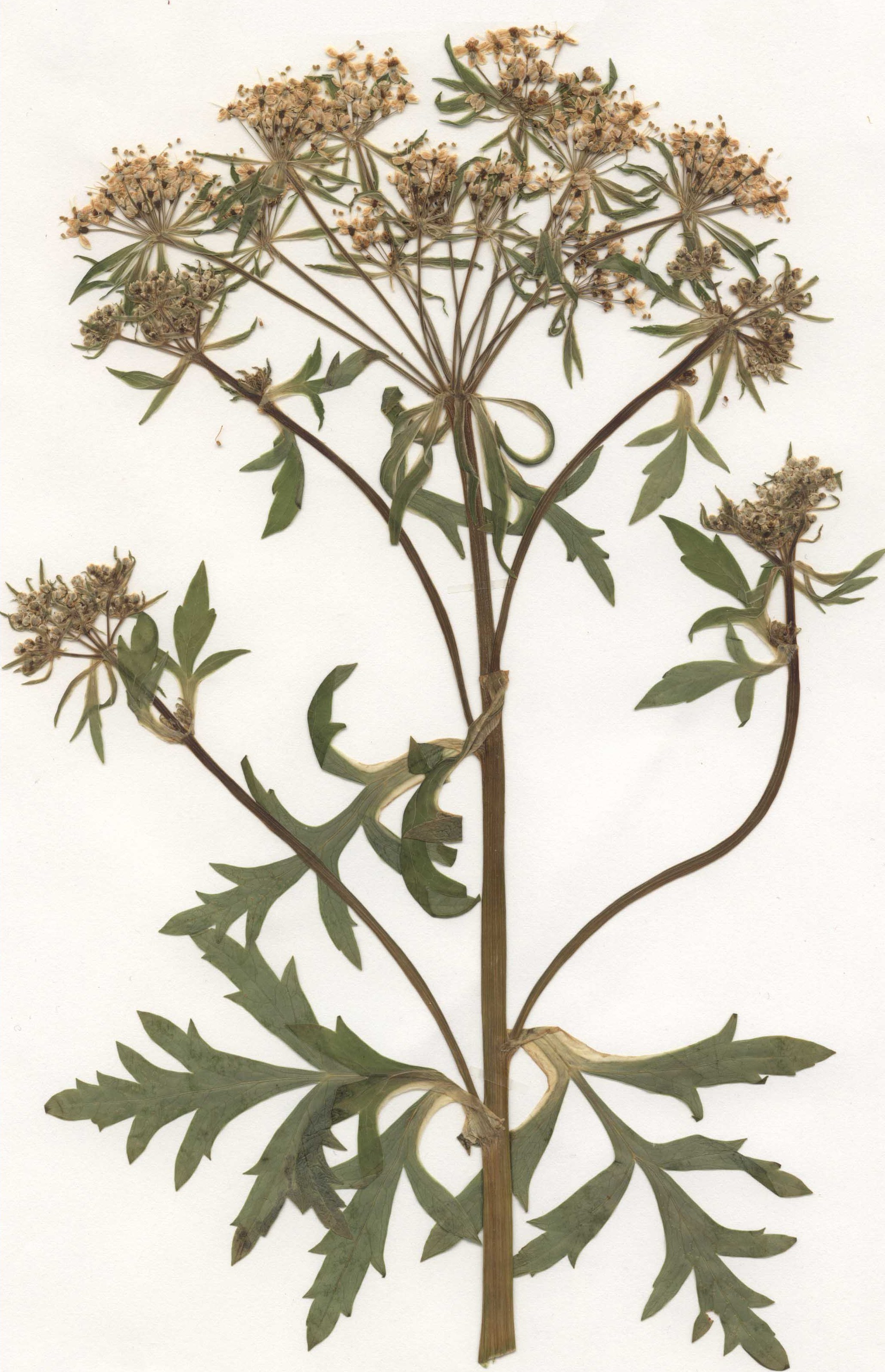 Pleurospermum austriacum, eigener Herbarbeleg von 1988, Unterfranken